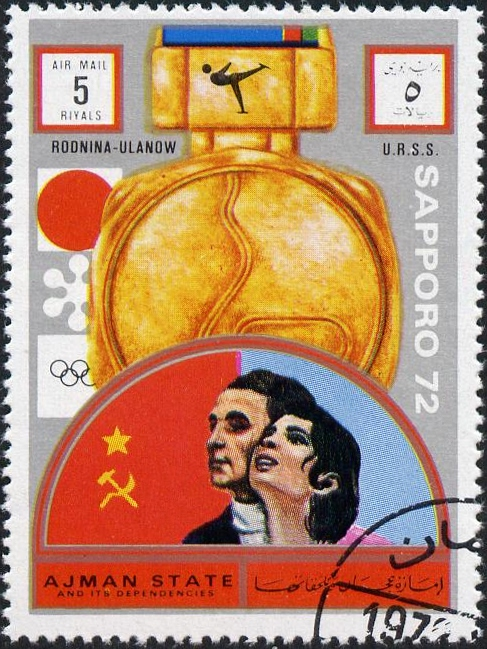 Alexei Ulanov and Irina Rodnina